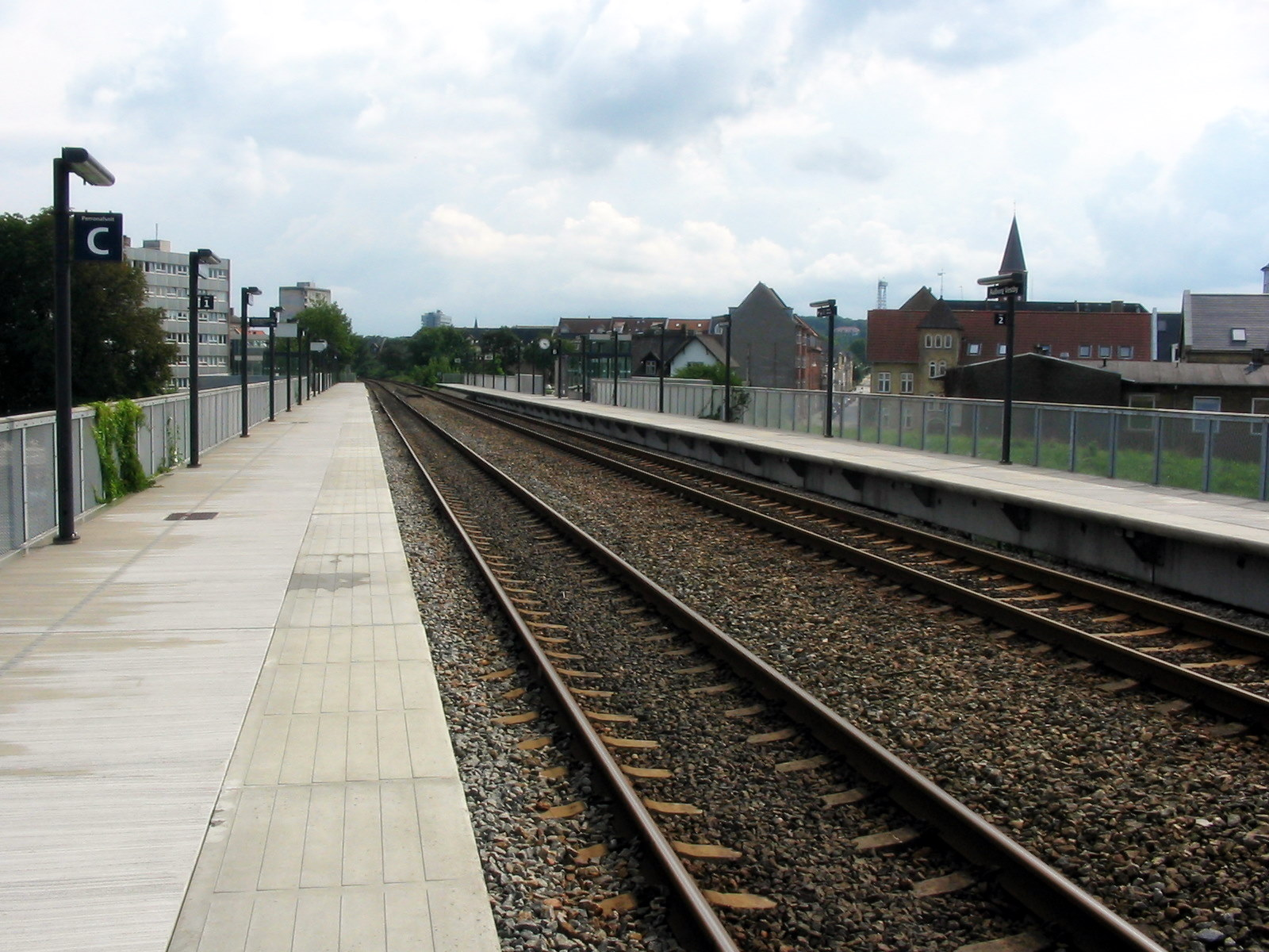 Aalborg Vestby Station